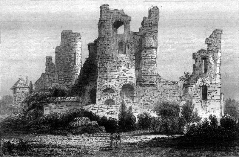 Image en provenance du livre : Eusèbe Girault de Saint-Fargeau, Guide pittoresque du voyageur en France, contenant la statistique et la description complète des quatre-vingt-six départements, orné de 740 vignettes et portraits gravés sur acier, de quatre-vingt-six cartes de départements et d'une grande carte routière de la France, par une Société de gens de lettres, de géographes et d'artistes, Paris, F. Didot frères, 1838, 6 volumes in-8° (BNF : 8-L25- 46). Volume III Didot frères, 1838. Route de Paris à Nice traversant les départements de l'Isère, des Hautes-Alpes, des Basses-Alpes et du Var. auteurs dessins : Rauch (ou autre) auteurs gravures : Skelton fils, Schroeder, Bishop (ou autre)